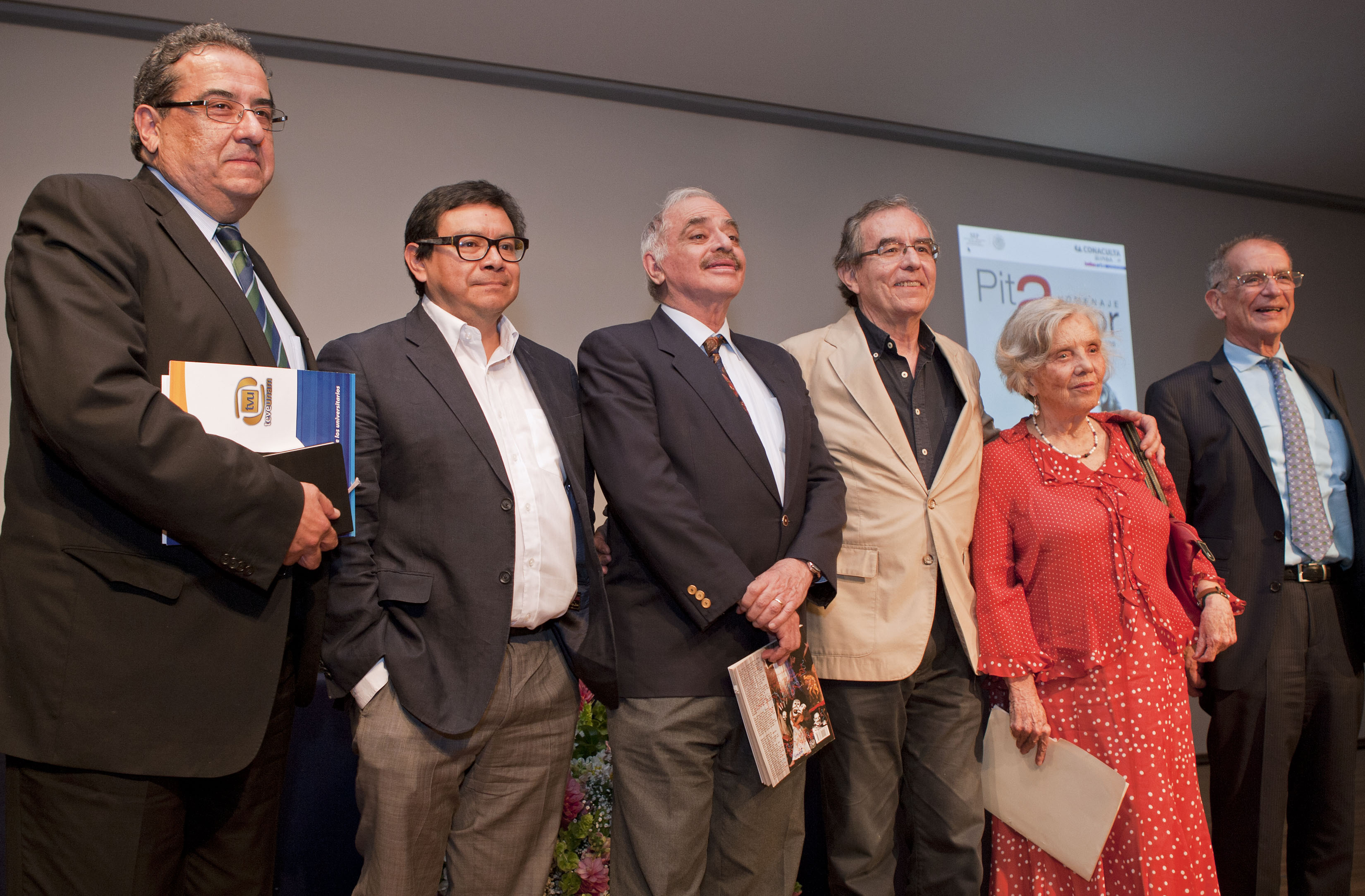 Homenaje a Pita Amor, Palacio de las Bellas Artes. Martes, 4 de Agosto 2015. Como parte de sus actividades de trabajo el Secretario de Cultura, Eduardo Vazquez Martin acudió al Homenaje a Pita Amor, en el cual se presentó el documental realizado por Eduardo Sepúlveda Amor, con la participación de la escritora Elena Poniatowska, Miguel Sabido, Andrés Torres, en la Sala Manuel M. Ponce del Palacio de Bellas Artes. Foto: Antonio Nava / Secretaría de Cultura de la Ciudad de México.